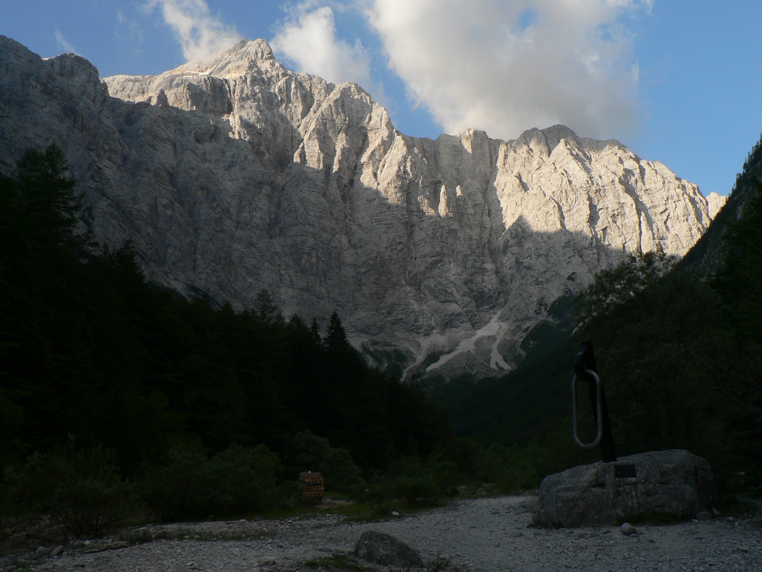 Severní stěna Triglavu